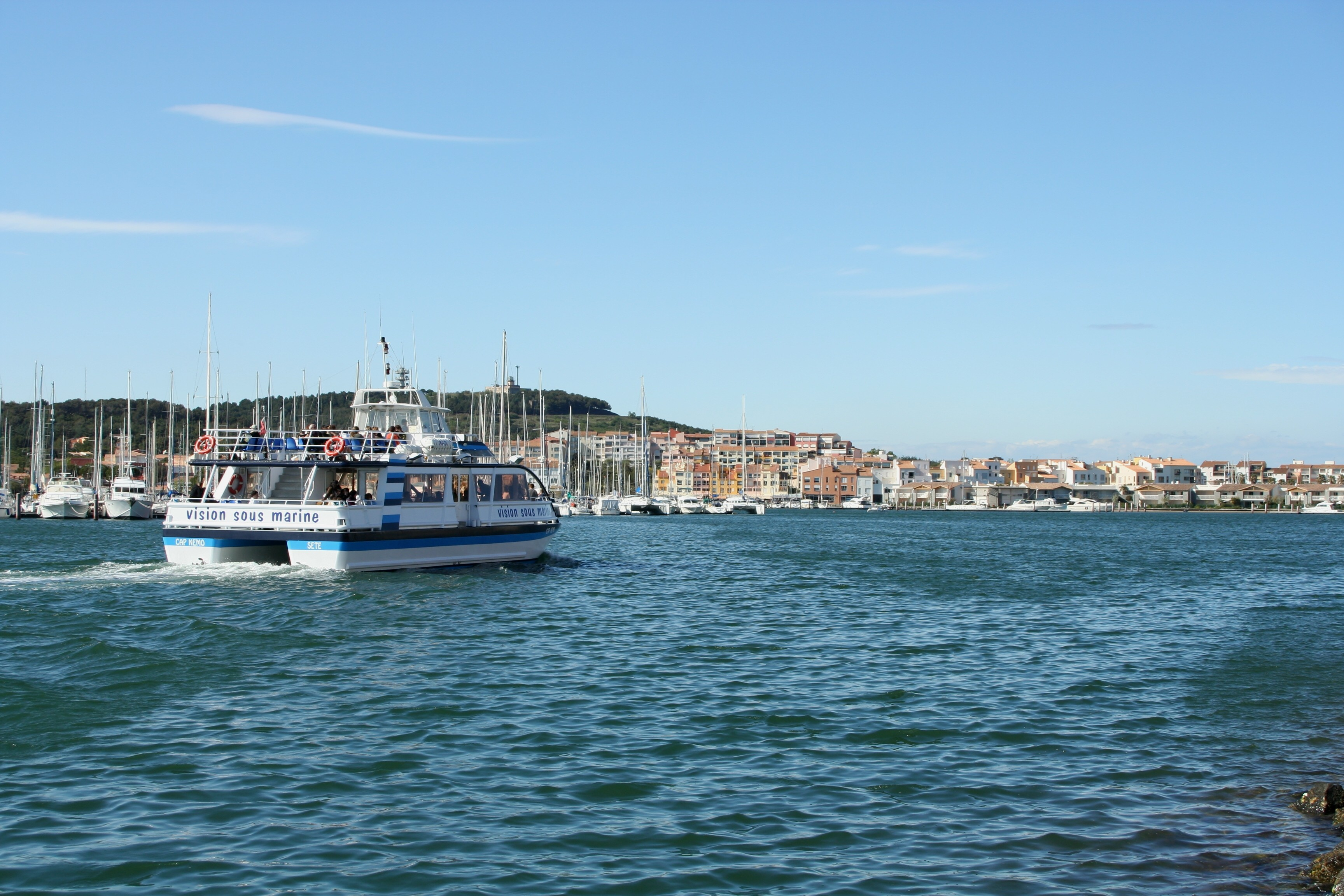 bateau promenade dans le port du Cap-d'Agde, Hérault